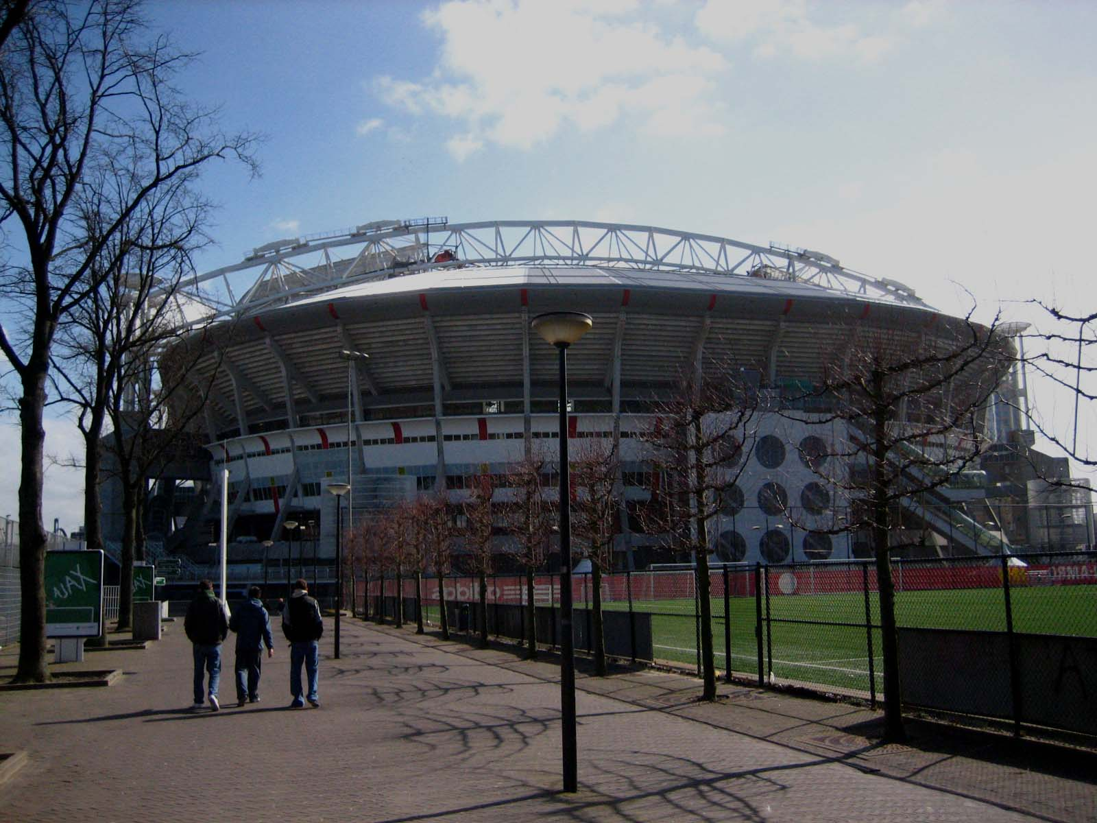 Ajax Arena modificada